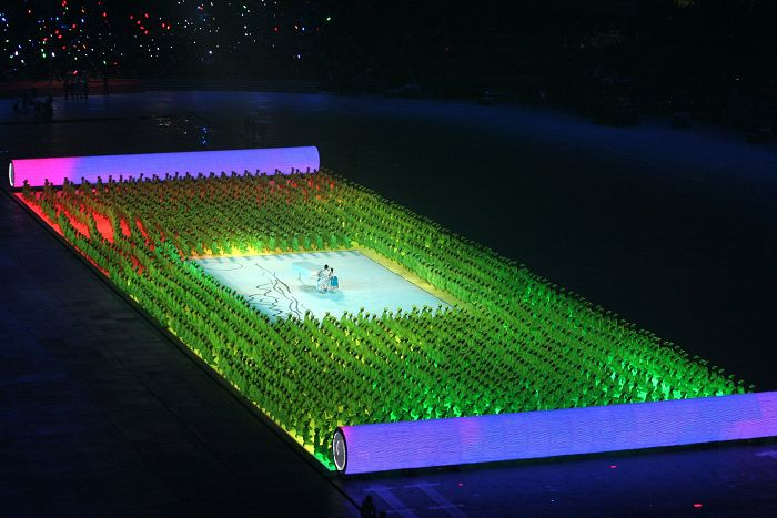 2008奥运开幕式——历史画卷